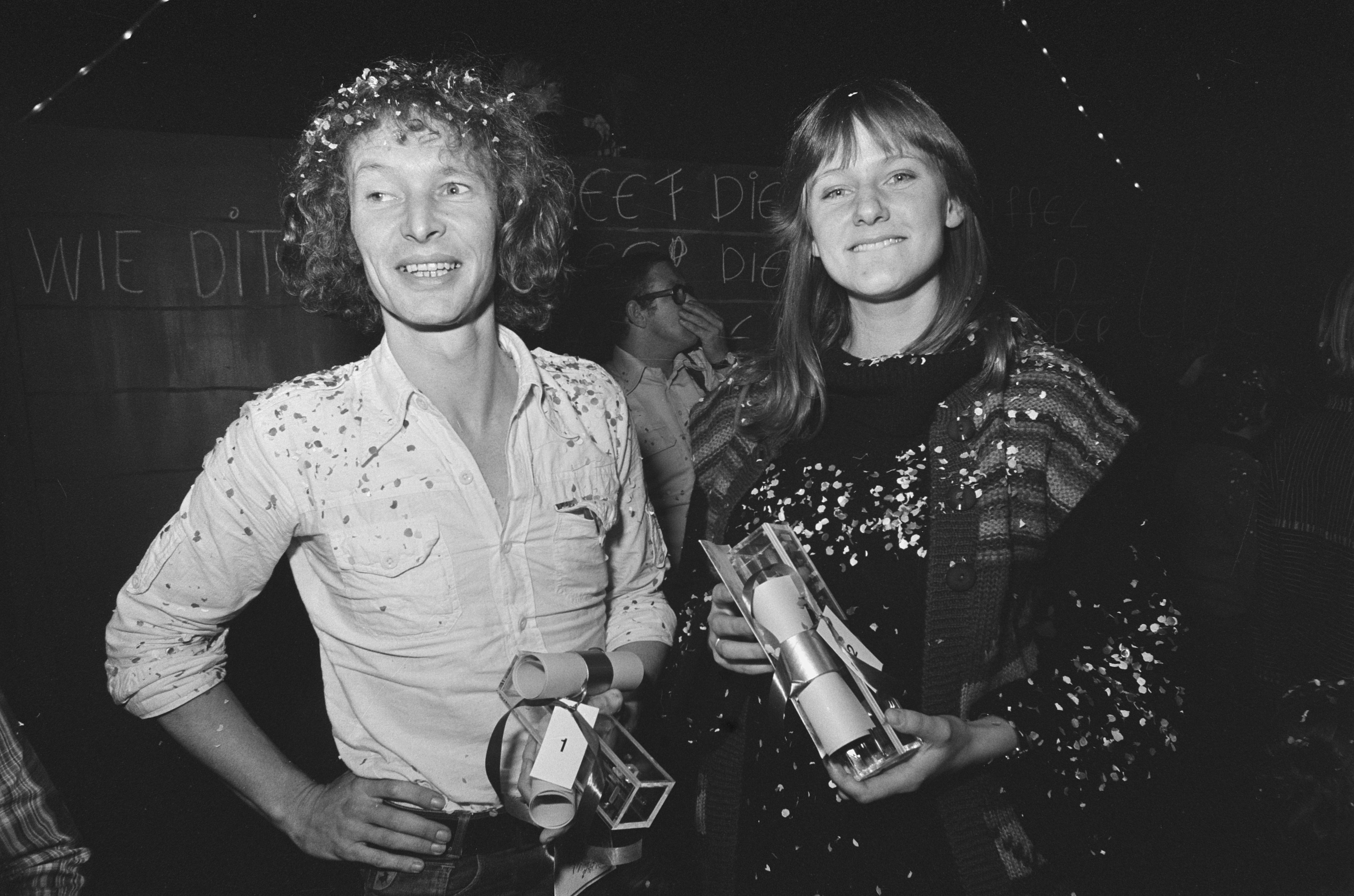 Collectie / Archief : Fotocollectie Anefo Reportage / Serie : [ onbekend ] Beschrijving : Uitreikingen gouden griffel/penseel; Guus Kuyer (met gouden griffel) (l) en Lidia Postma met gouden penseel Datum : 13 oktober 1976 Trefwoorden : Uitreikingen Fotograaf : Suyk, Koen / Anefo Auteursrechthebbende : Nationaal Archief Materiaalsoort : Negatief (zwart/wit) Nummer archiefinventaris : bekijk toegang 2.24.01.05 Bestanddeelnummer : 928-8269